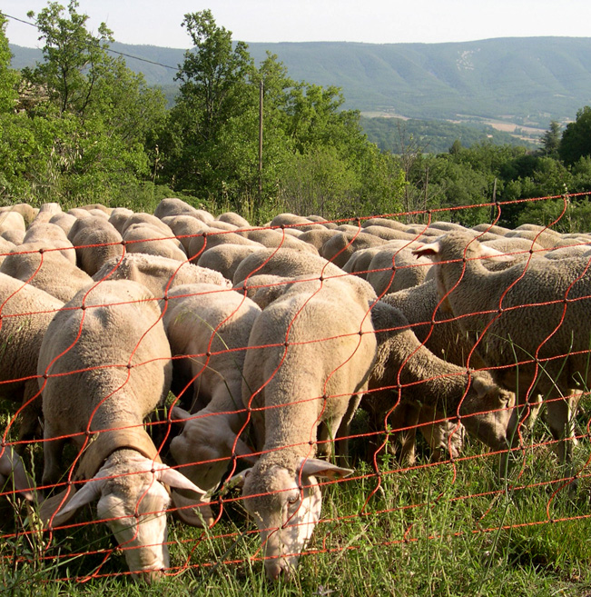 Moutons près de Viens. Canton d’Apt. Département de Vaucluse. Région Provence-Alpes-Côte d'Azur. France